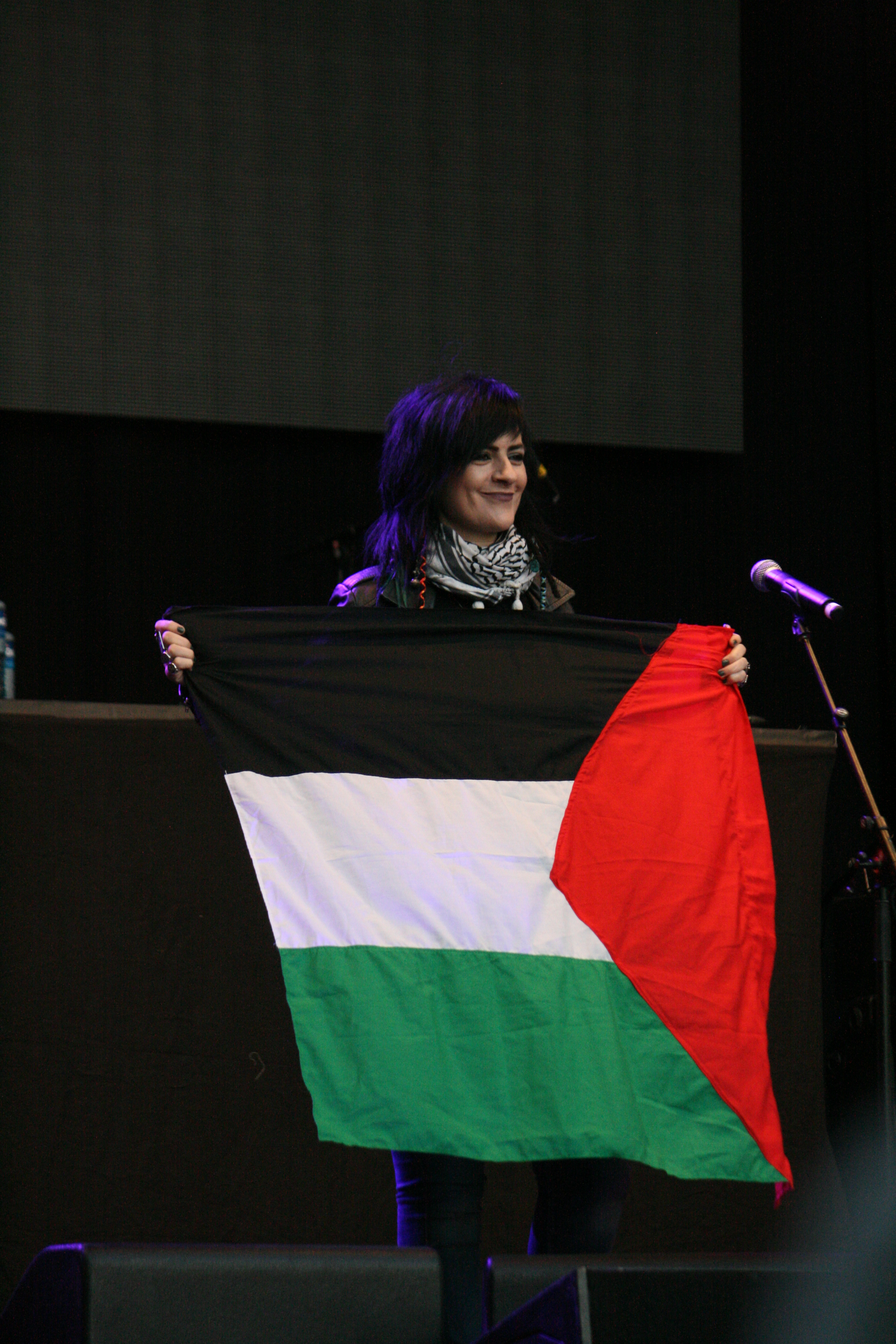 Musikk for Gaza, Oslo 3.9.2014 ريم بنا تغني من أجل غزة في مهرجان "ميلا" بأوسلو Rim Banna